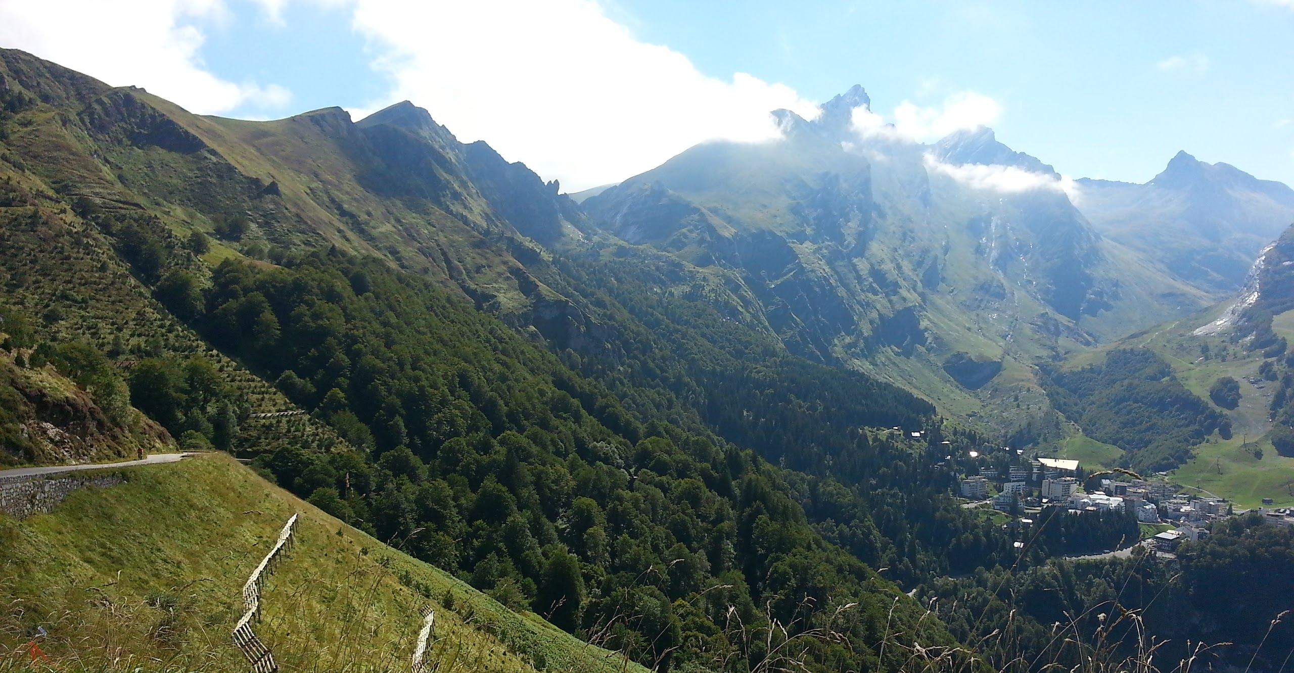 Vue sur le massif du Grand Gabizos et Gourette